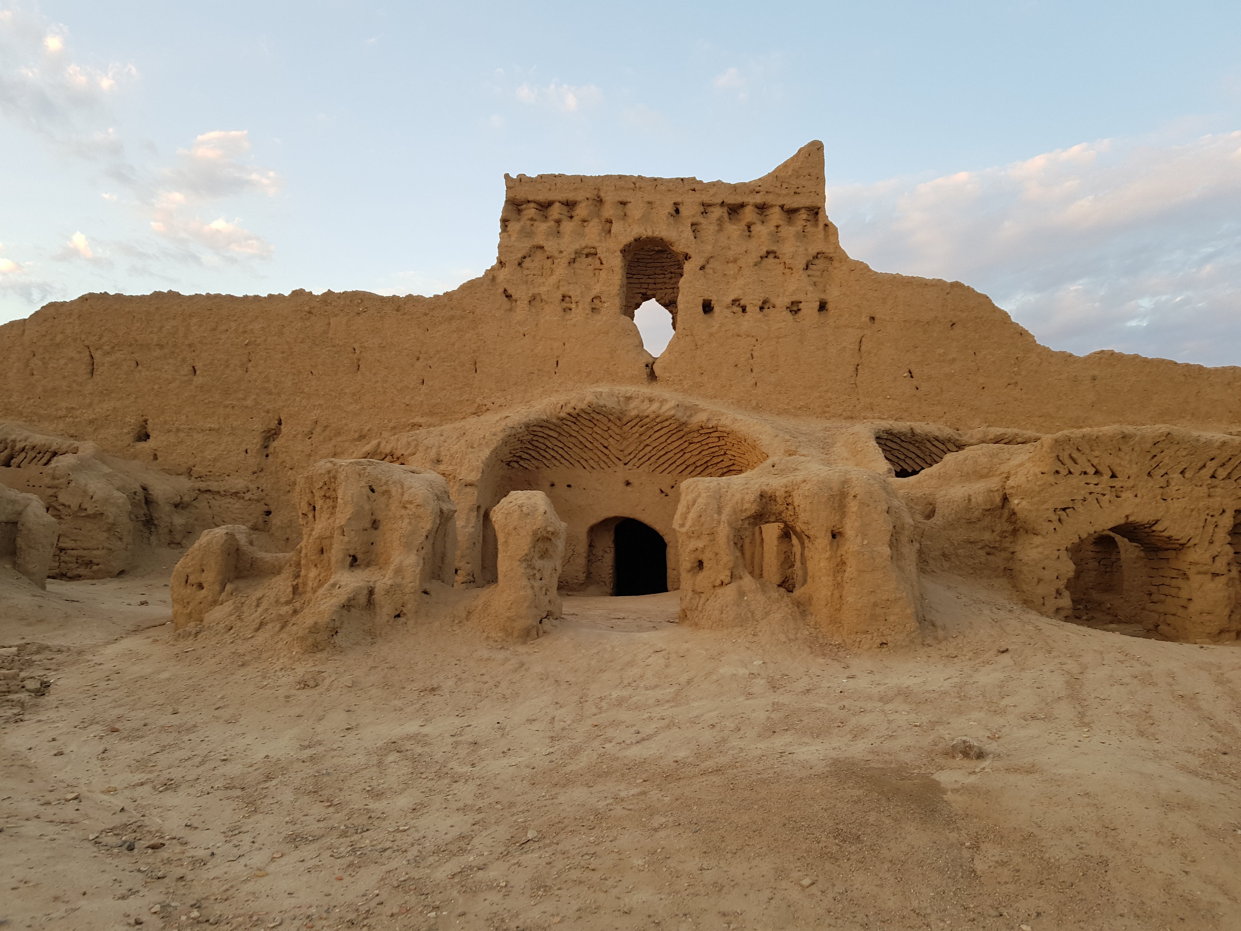 تپه حصار